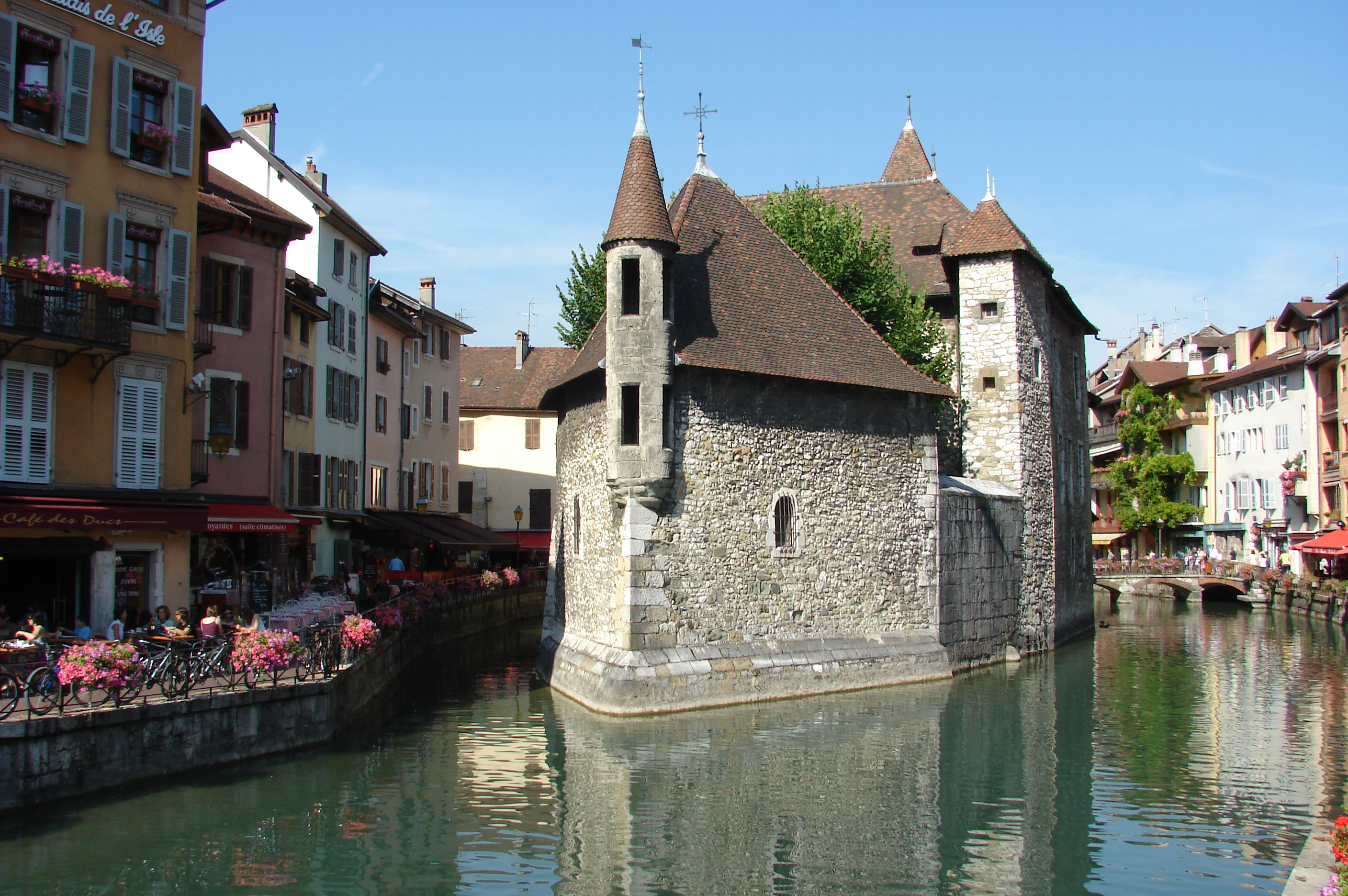 Annecy